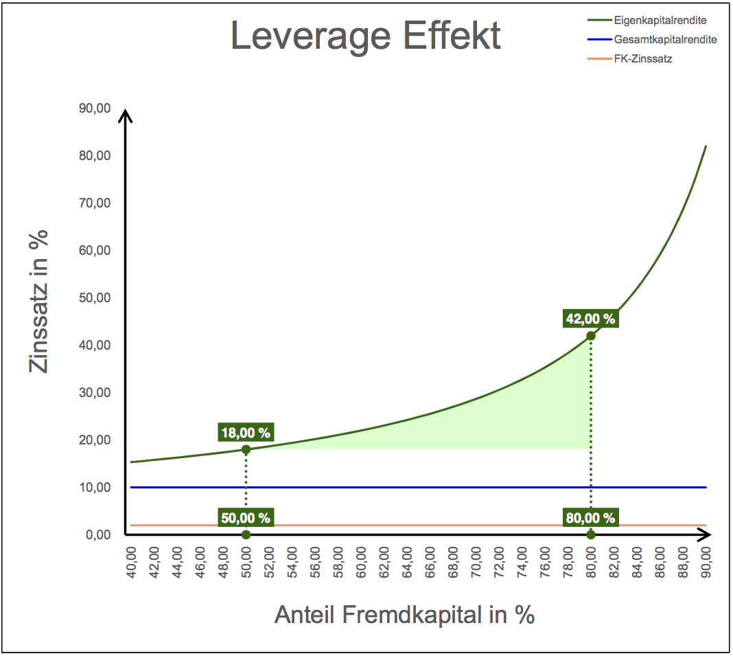 Leverage Effekt